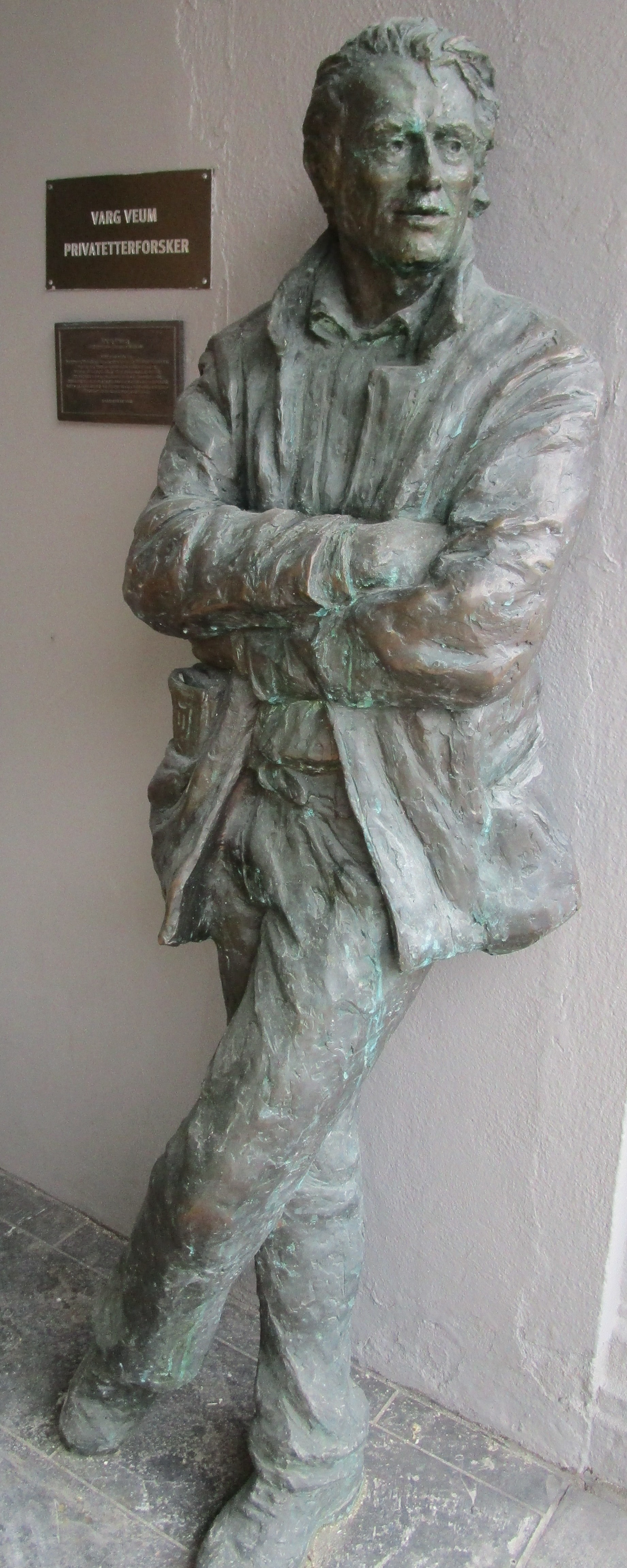 Dit standbeeld van Varg Veum staat bij zijn kantooradres, Strandkaia 2 te Bergen